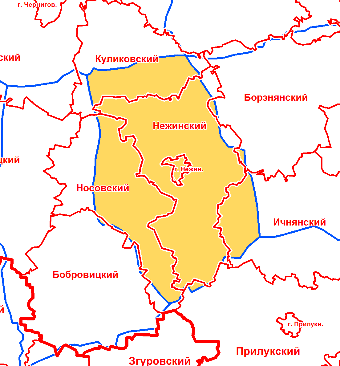 Нежинский уезд Черниговской губернии в современной сетке районов